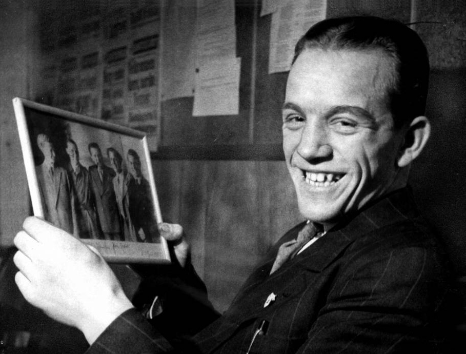 Svend Aage Sørensen